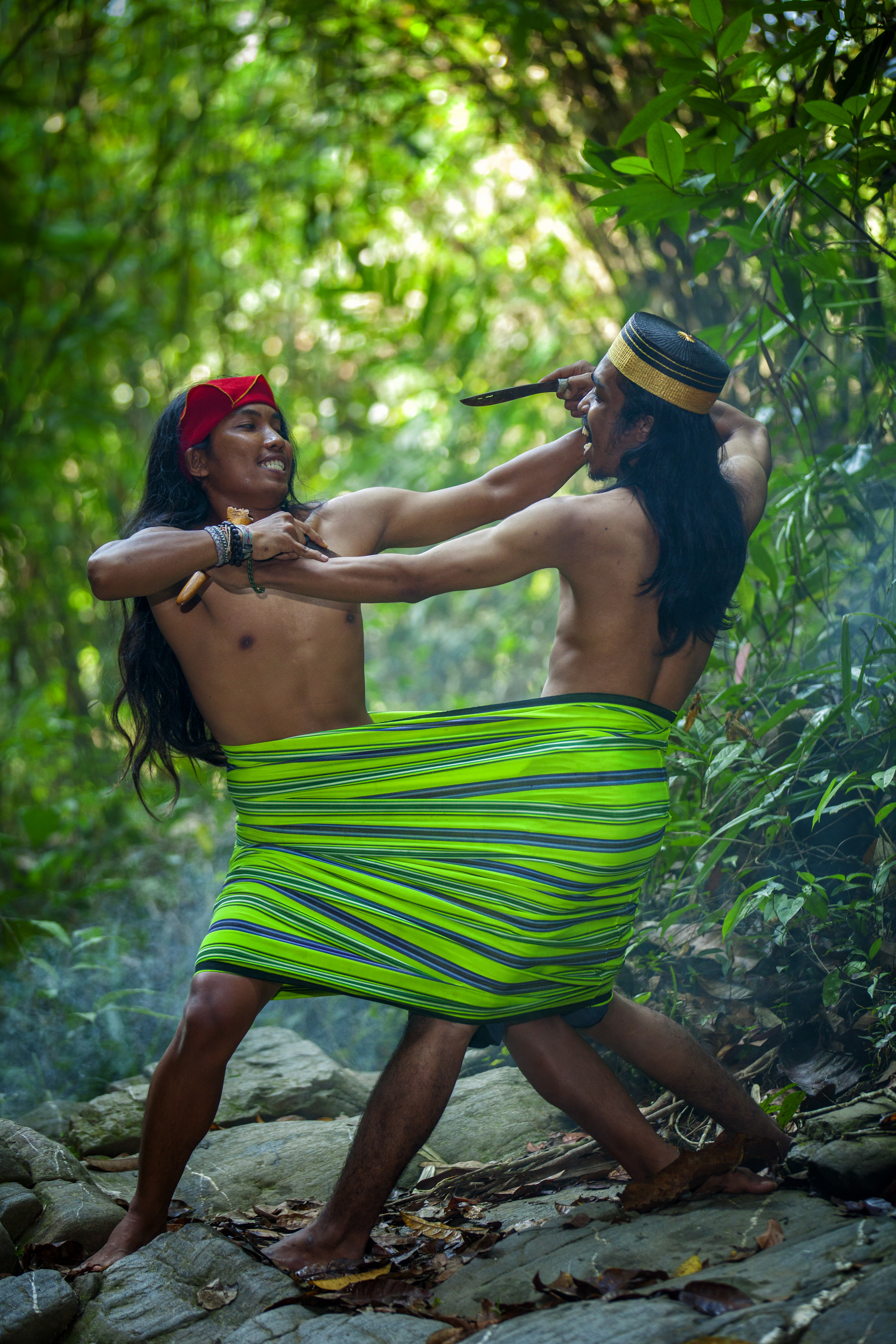 Lewat ritual yang ada di Sulawesi Selatan, pemuda yang bermasalah akan saling tikam menggunakan badik, pemuda yang bermasalah tersebut akan "dikurung" dalam satu sarung yang sama. badik adalah salah satu senjata tradisional Bugis.